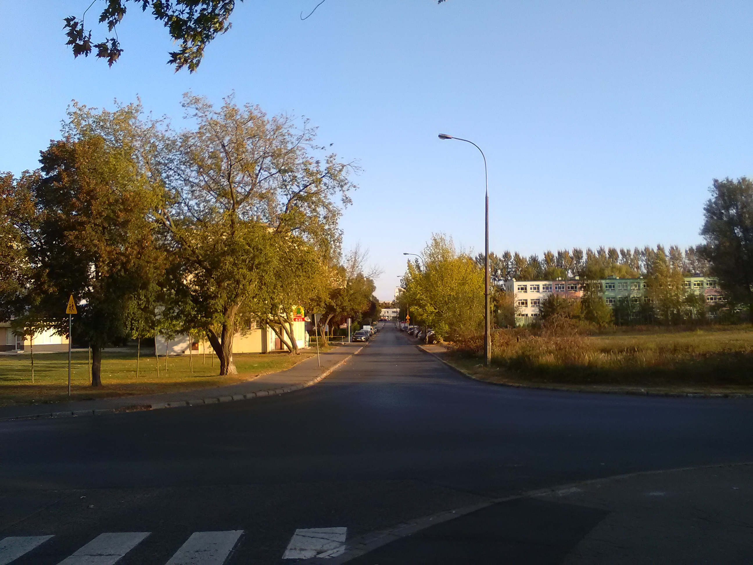 Ulica Wyzwolenia w Poznaniu. Odcinek na osiedlu Rzeczypospolitej.